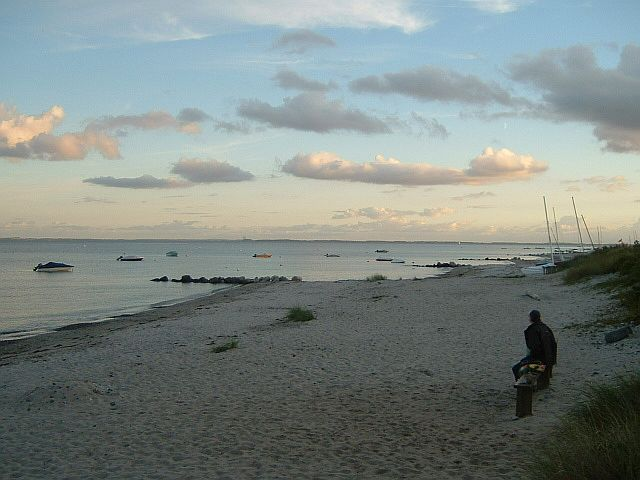 Neustädterbucht (Höhe Pelzerhaken), Blick nach Süden Richtung Travemünde. Landscape in Schleswig Holstein, Germany.